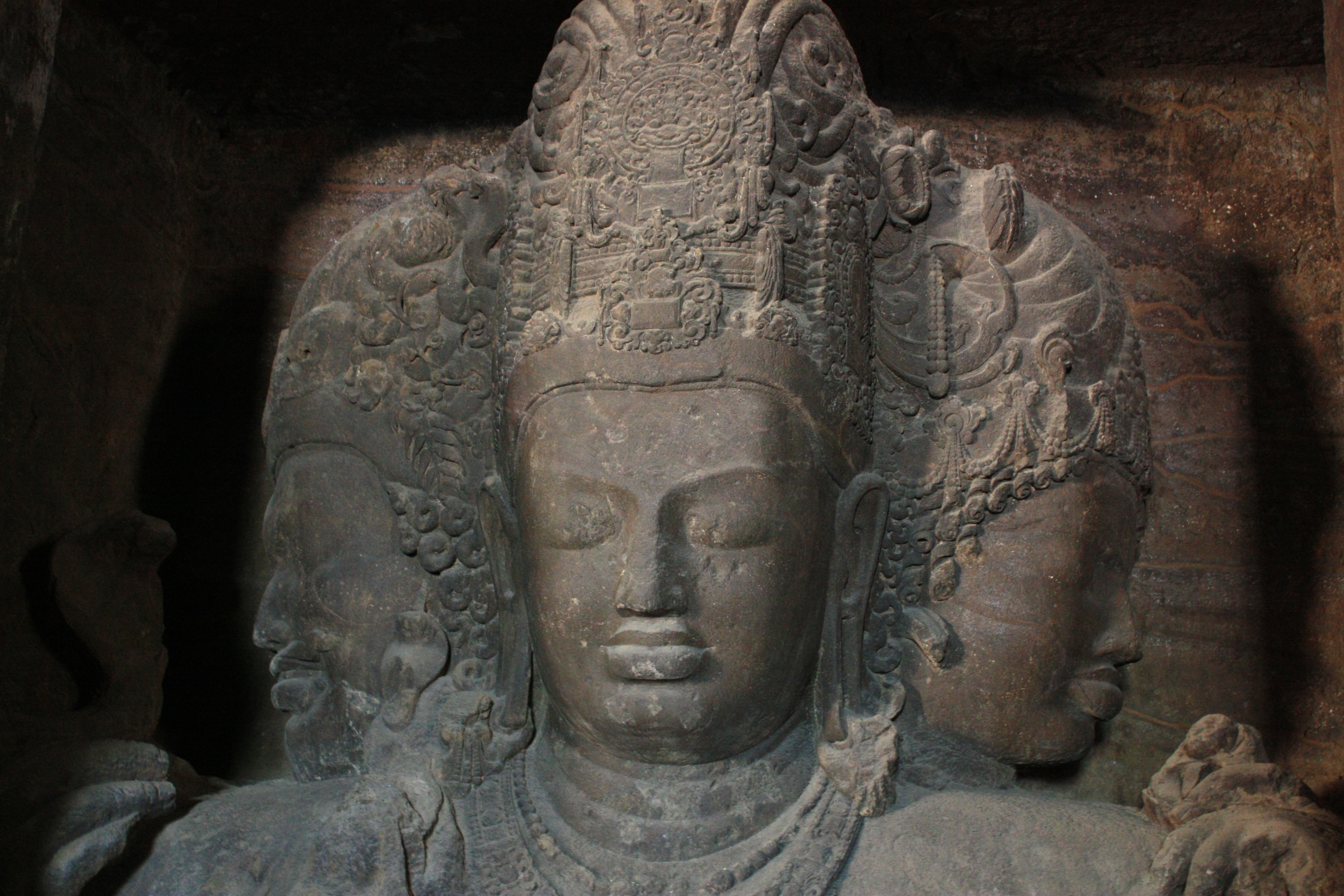 Shiva @ Elephanta Caves